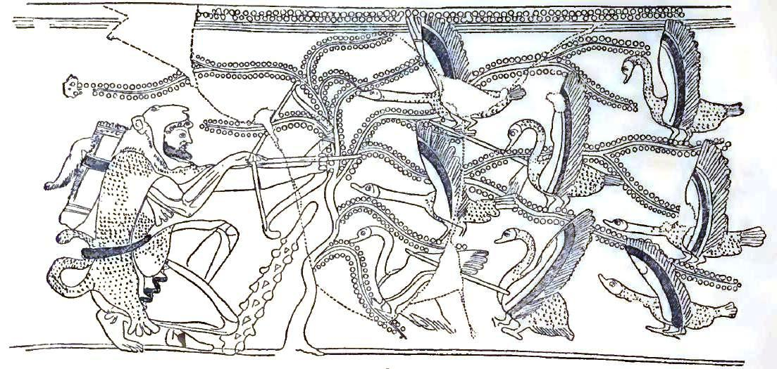 Herakles erlegt mit Pfeilen die stymphalischen Vögel